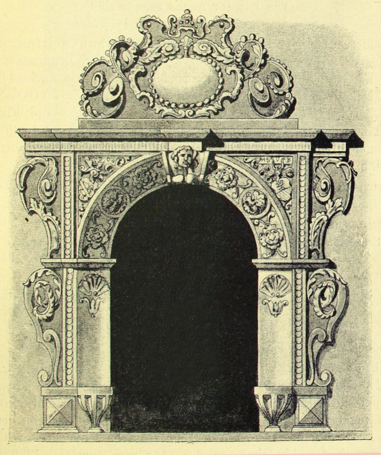 Gut Lauer: Treppentor aus Sandstein von 1648 mit dem von Dieskauschen Wappen (links)